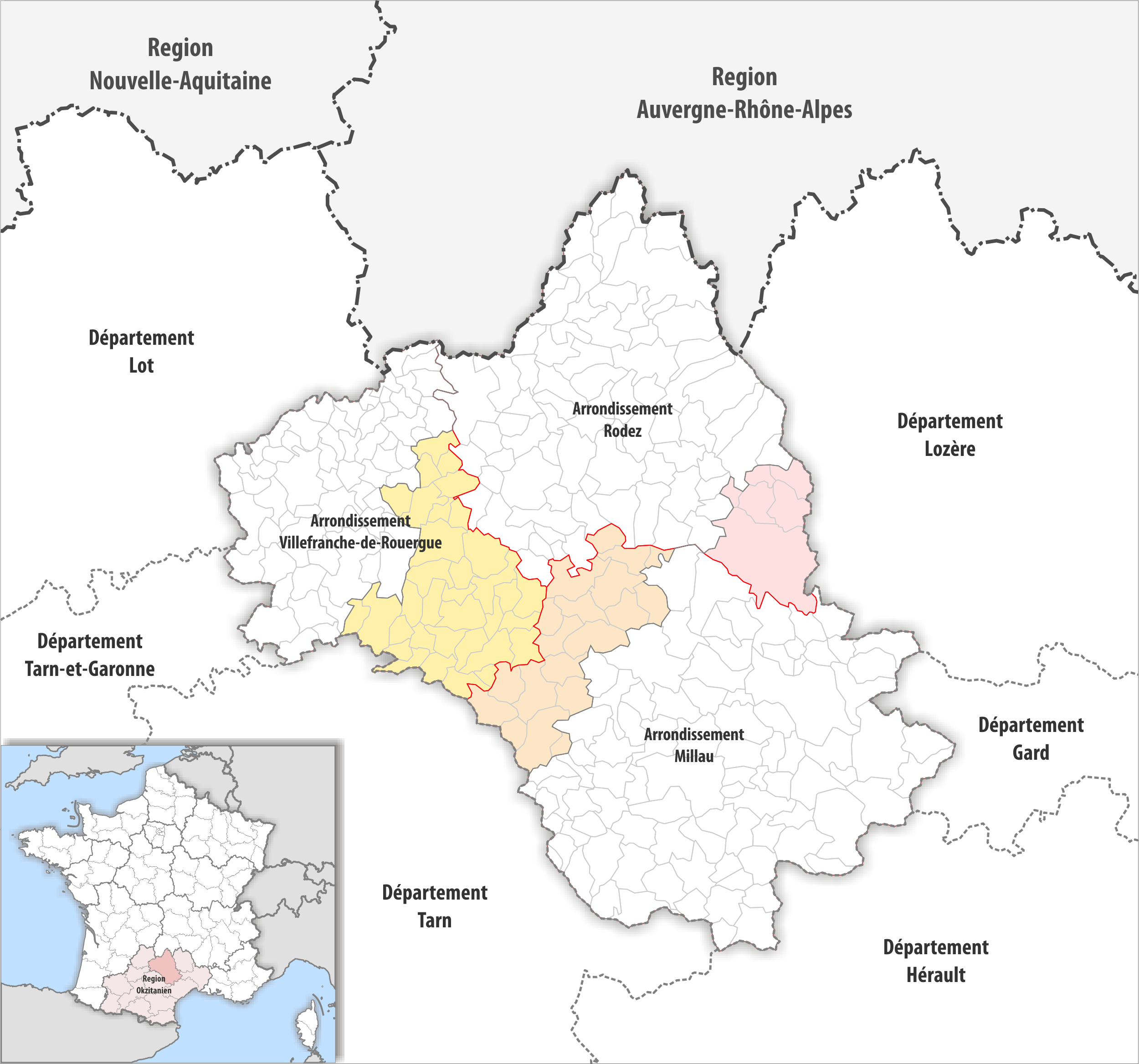 Arrondissements Anpassungen auf 2017 im Departement Aveyron